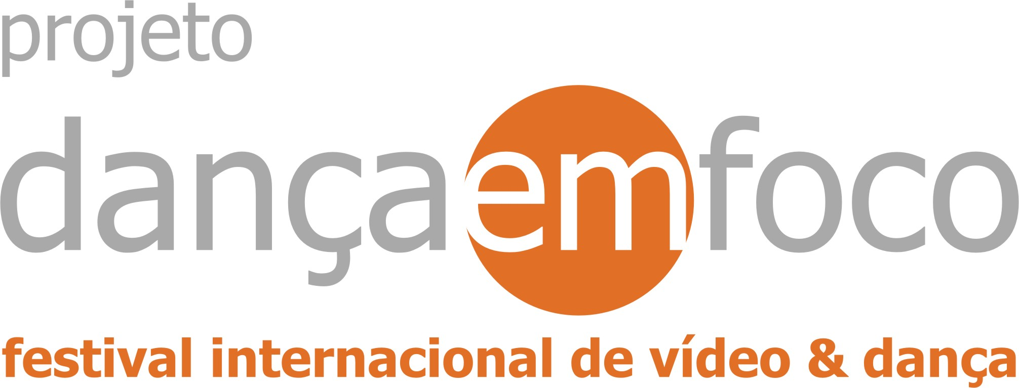 Logomarca oficial do projeto cultural "dança em foco", um festival internacional de videodança, que tem lugar nas cidades do Rio de Janeiro e São Paulo anualmente.